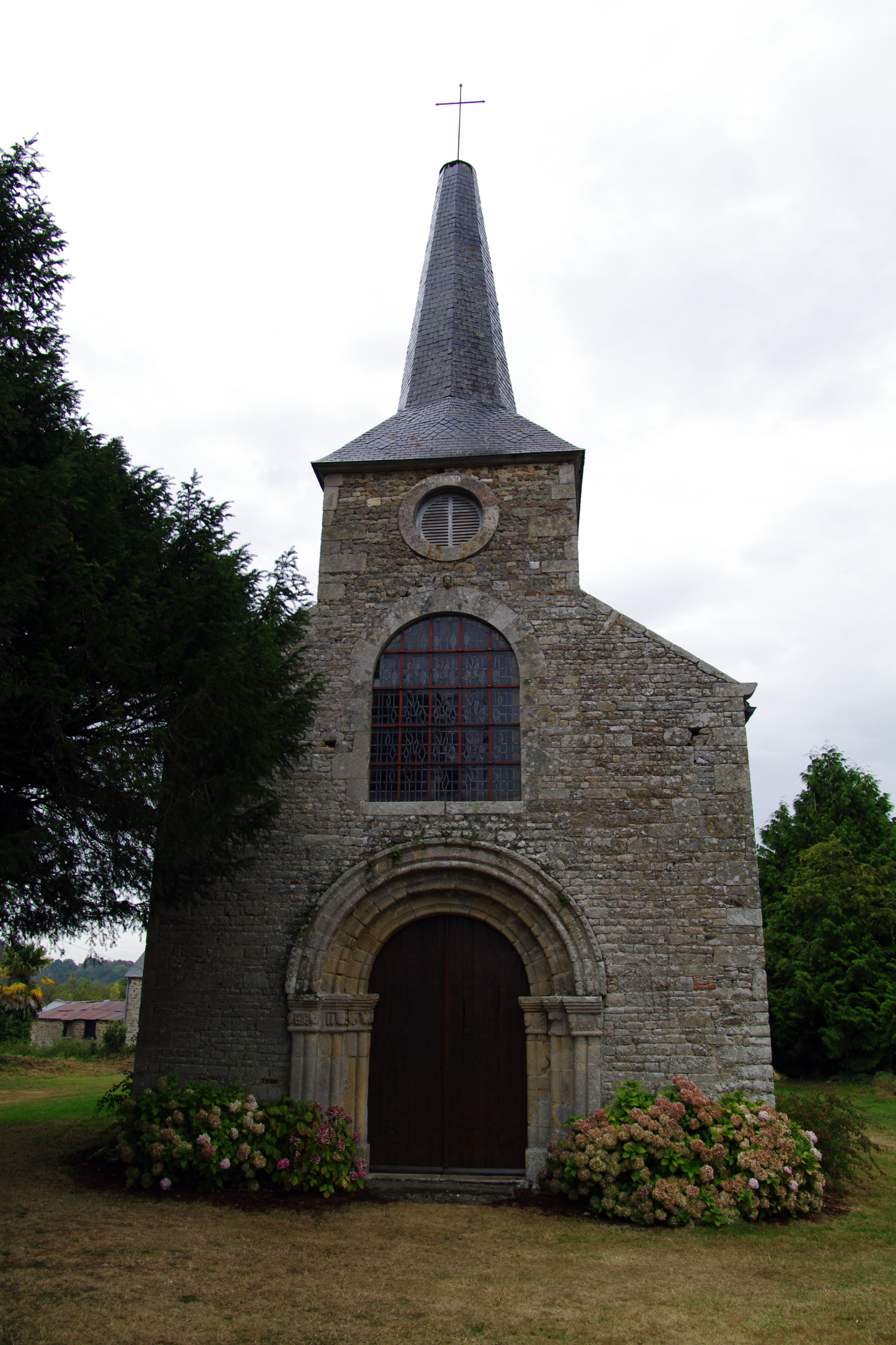 Ancienne église Saint-Lunaire, (Inscription, 1964) .